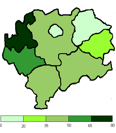 Lesistość w kościerskim na podstawie danych z wrót pomorza